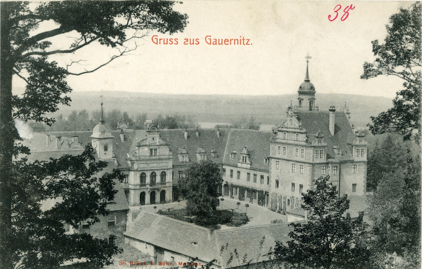 Gauernitz; Schloss This postcard is from publisher Brück & Sohn in Meißen ( postcard has a unique number 00038 and is available in a higher resolution at the publisher. This images was uploaded in a cooperation project between Wikipedians and the publisher.